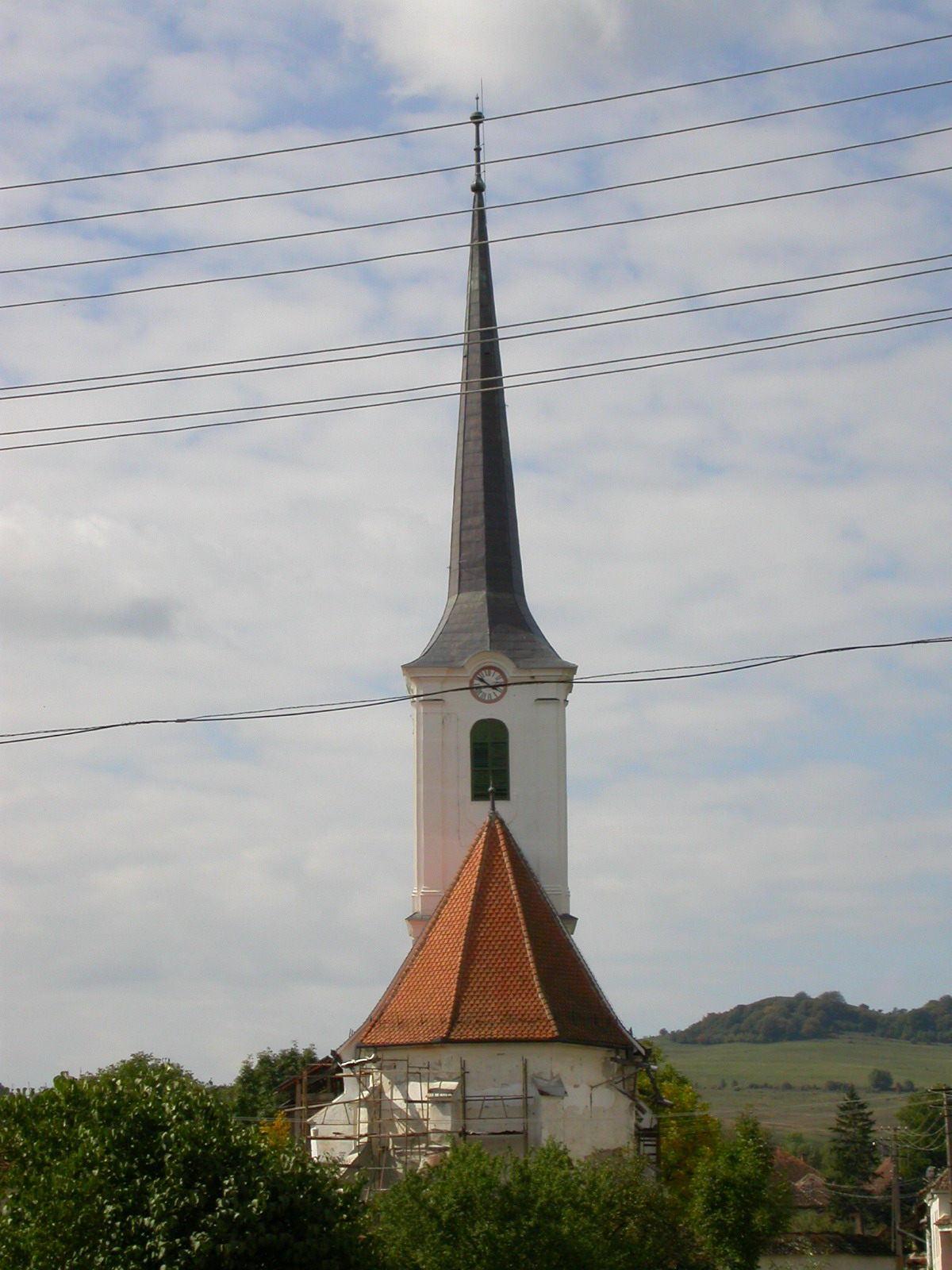 Ansamblul bisericii reformate, sec. XIV - XVIII